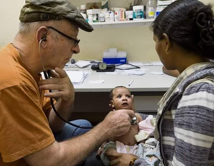 Dr. Dan Murphy